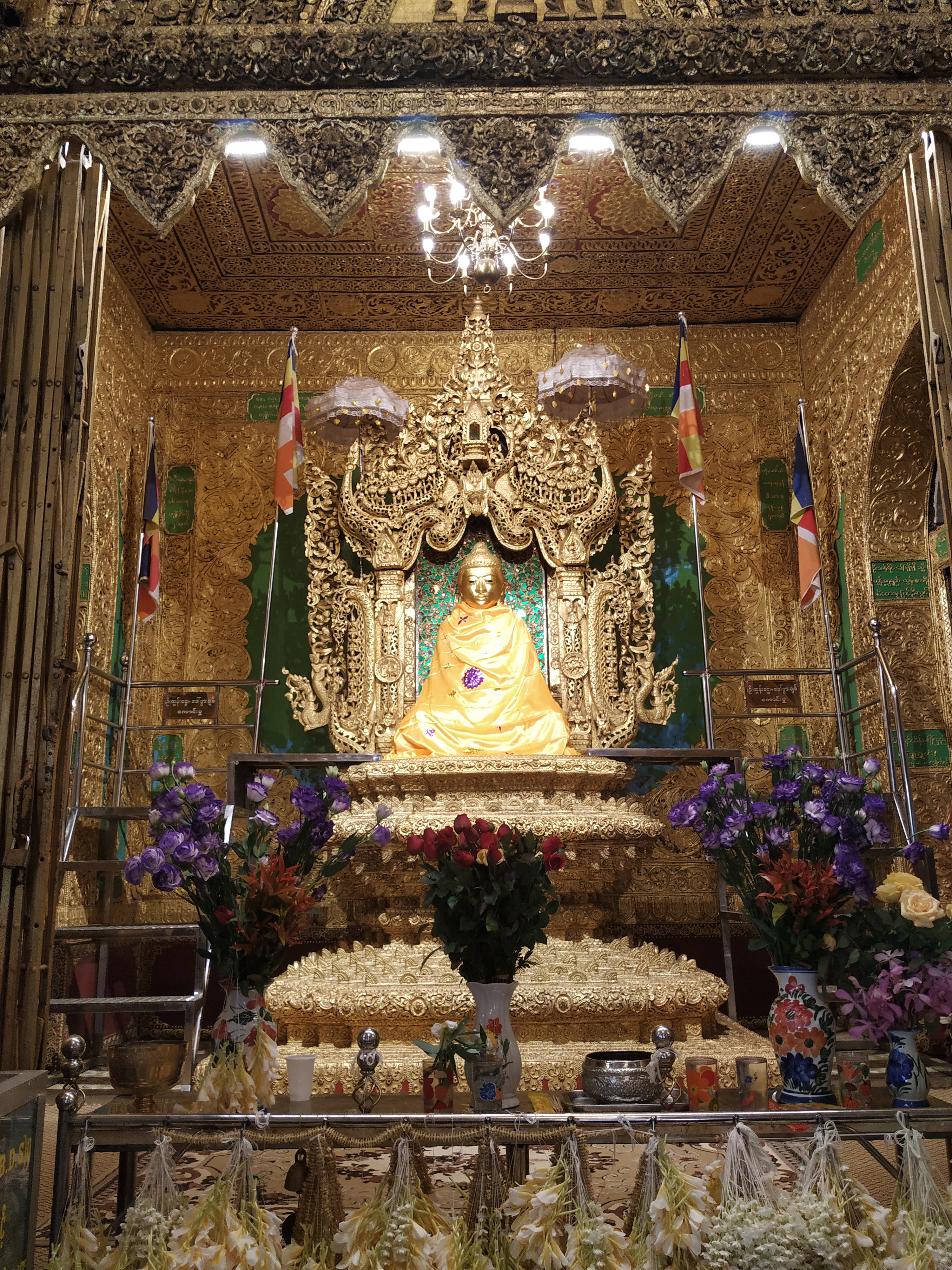 ကျိုက်ပေါလော မှဲ့ရှင်ဘုရား၊ ကျိုက်ထိုမြို့၊ မွန်ပြည်နယ်။